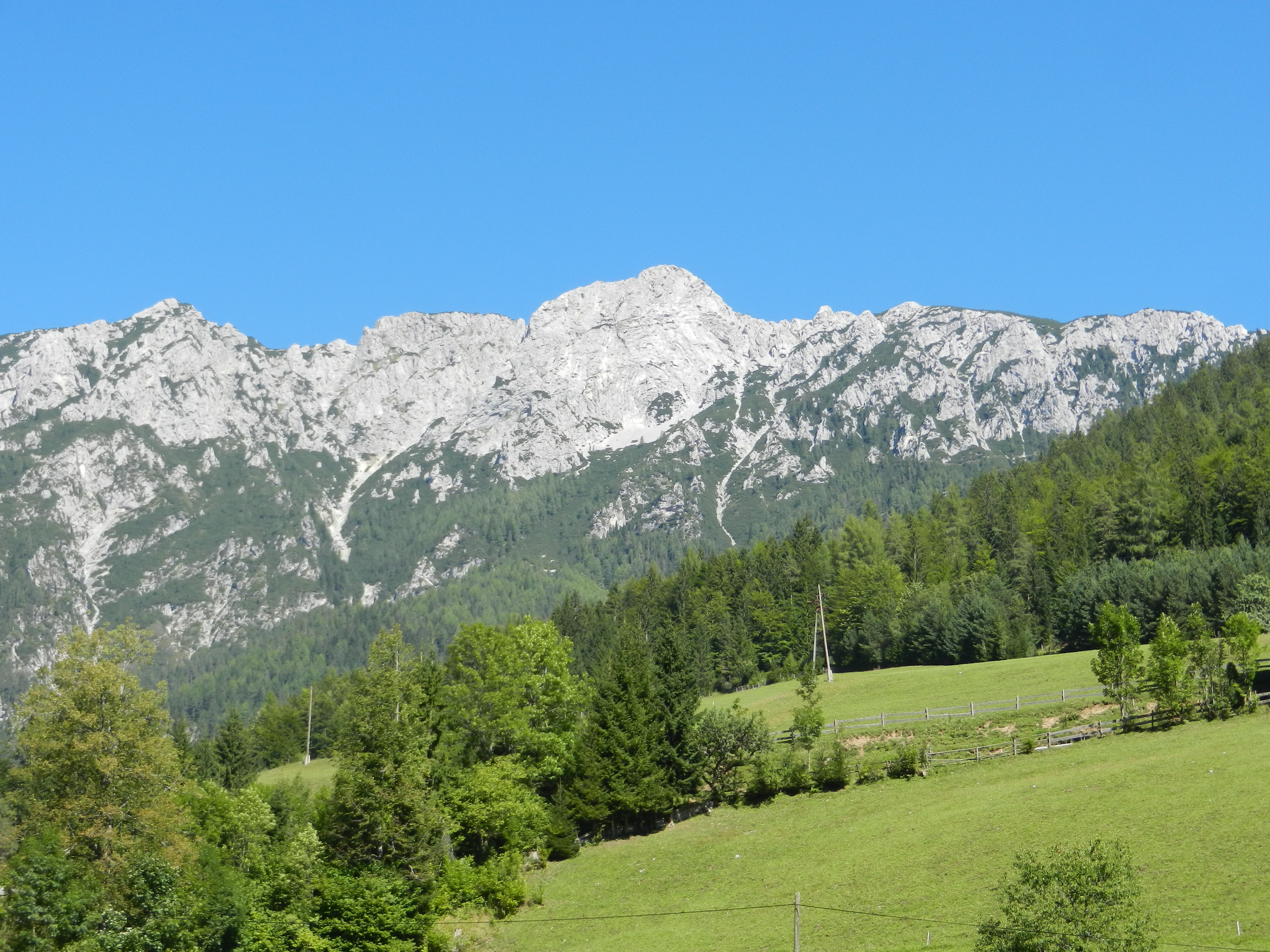 Peca nad Toplo